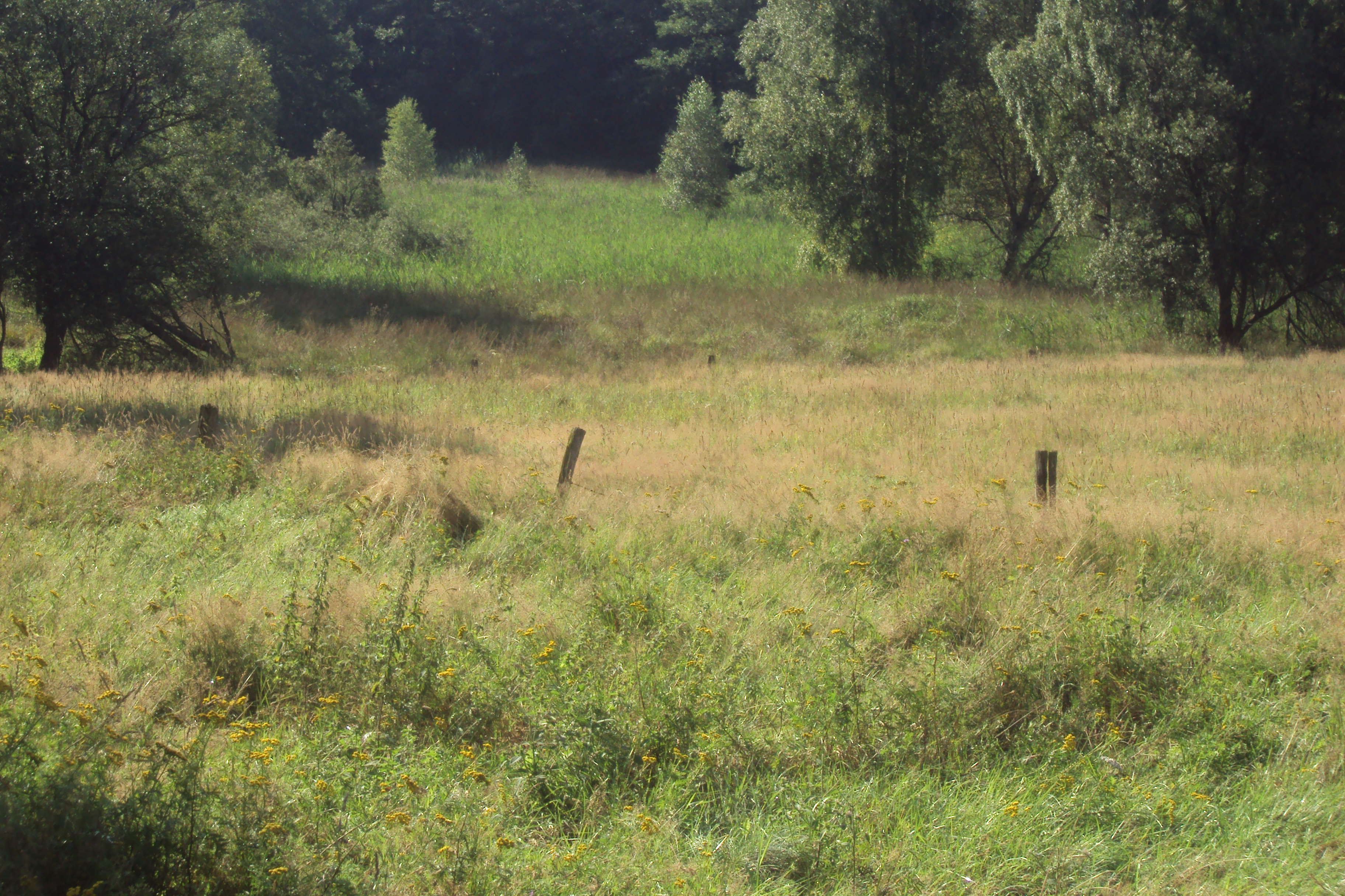 Přírodní rezervace Rašeliniště Mařeničky, shora od cesty